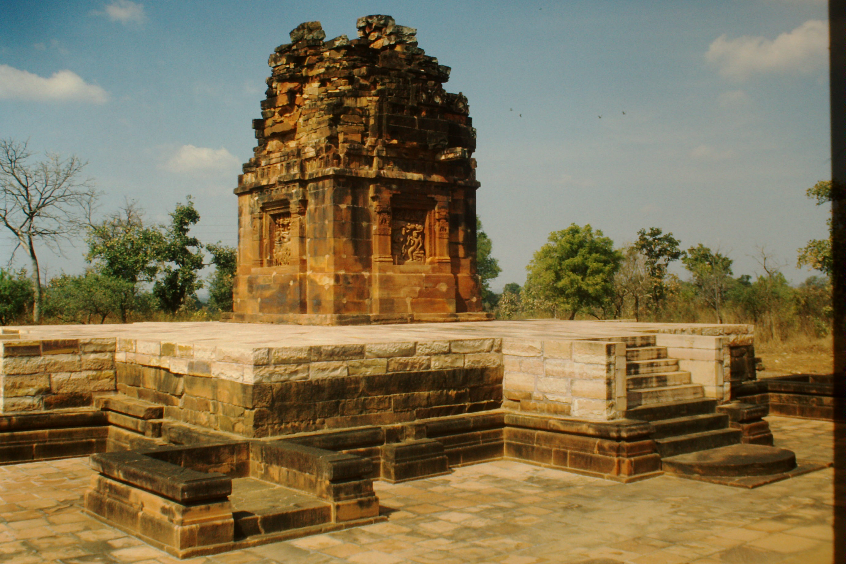 Deogarh Dasavatara-Tempel